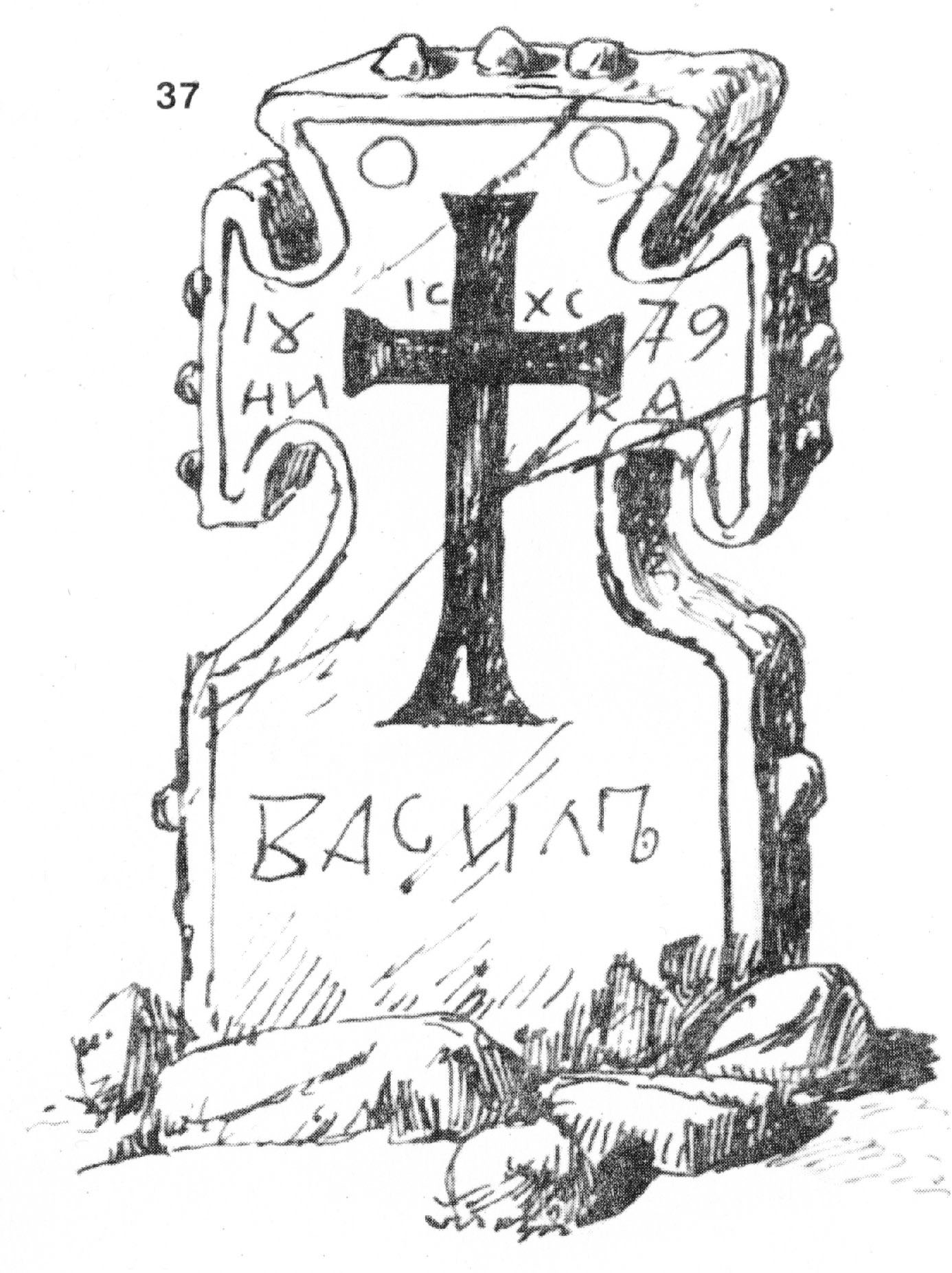 37. Кръст от едрозърнест пясъчник из гробищата на гр. Фердинанд, по пътя за Берковица, под гарата. Размери: 120x58x17 см. Четирикрилен; горните три крила завършват с по три ябълки; долното - отстрани по една ябълка. Върху лицето е издълбан голям кръст, надпис, монограм, дата 1879 г. Груба изработка. Скициран на 11.VIII.1930 г. (Т. 14, обр. 60.)